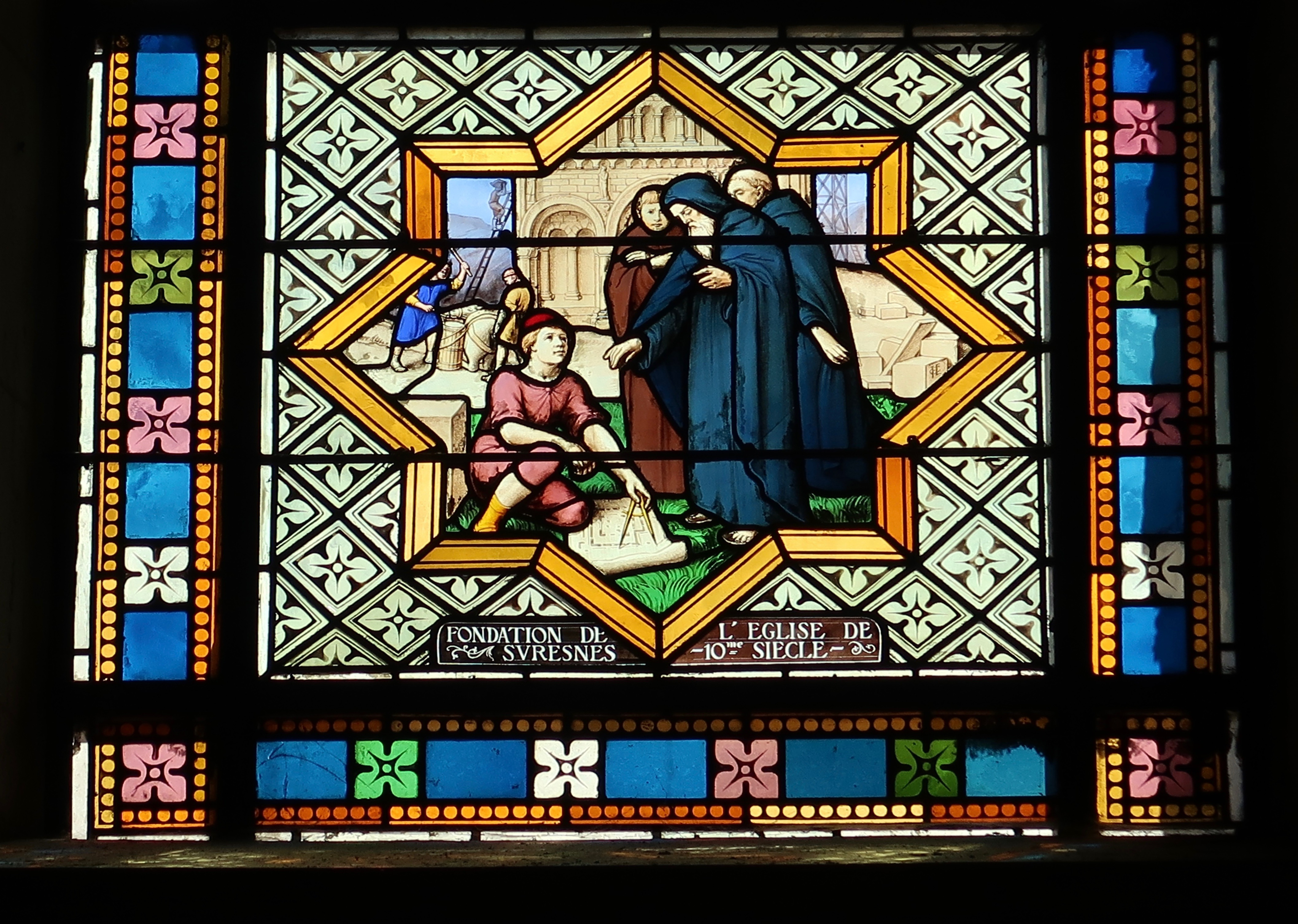 Détail d'un vitrail de l'église Cœur-Immaculé-de-Marie de Suresnes (Hauts-de-Seine) : « Fondation de l'église de Suresnes - Xe siècle ».